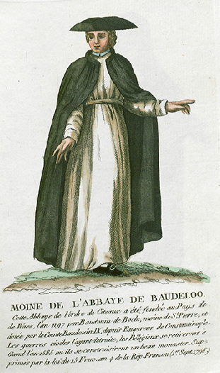 Collection de costumes de tous les ordres monastiques, supprimés à differentes époques, dans la ci-devant Belgique, Bruxelles, Philippe Joseph Maillart et sœur, 1811